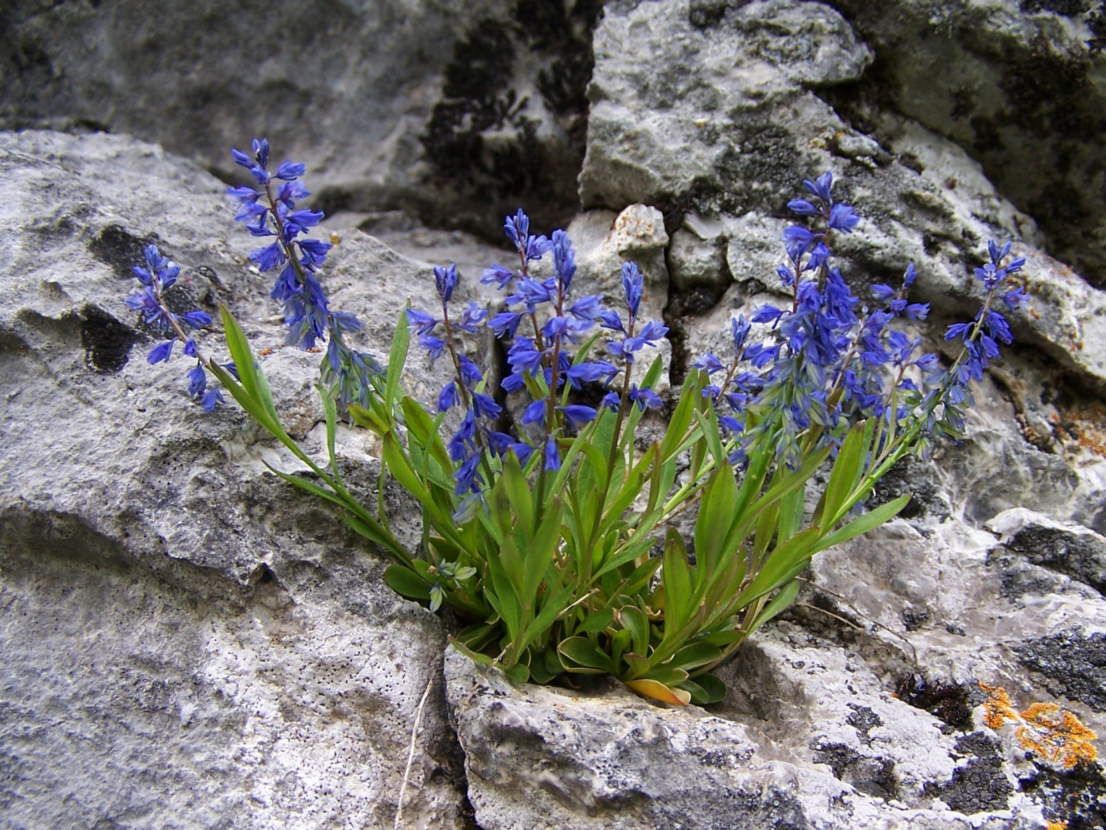 Polygala amara (pl. krzyżownica górska), habitat: Tatra Mountains, Hala Upłaz